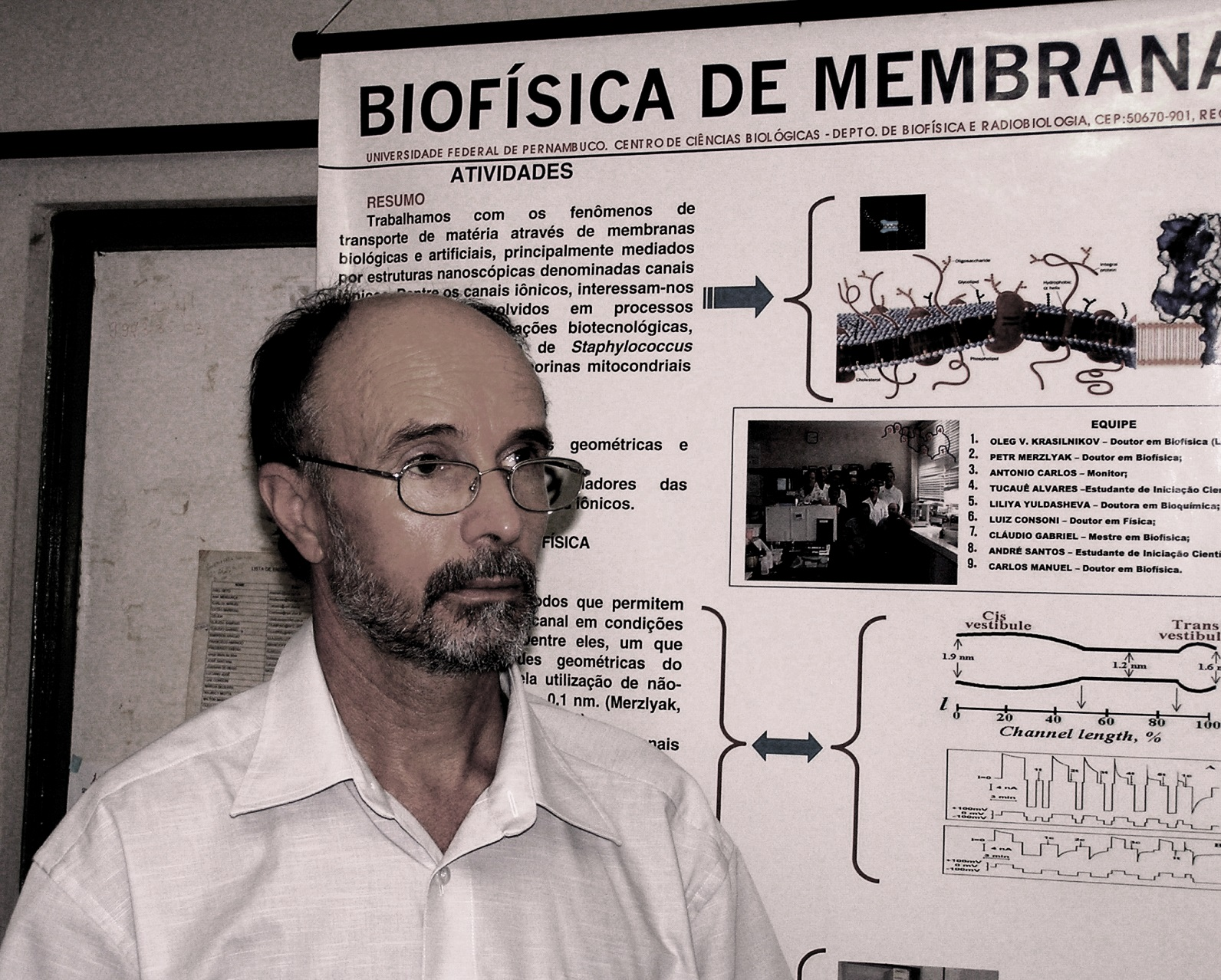 Oleg Vladimirovich Krasilnikov 2005